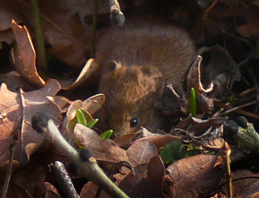 Myodes glareolus ou Campagnol_roussâtre, photographié dans la forêt jardinisée et domaniale de Bonsecours, Nord de la France, à Condé-sur-Escaut. Photo prise lors d'un chantier de démonstration de débardage par câble